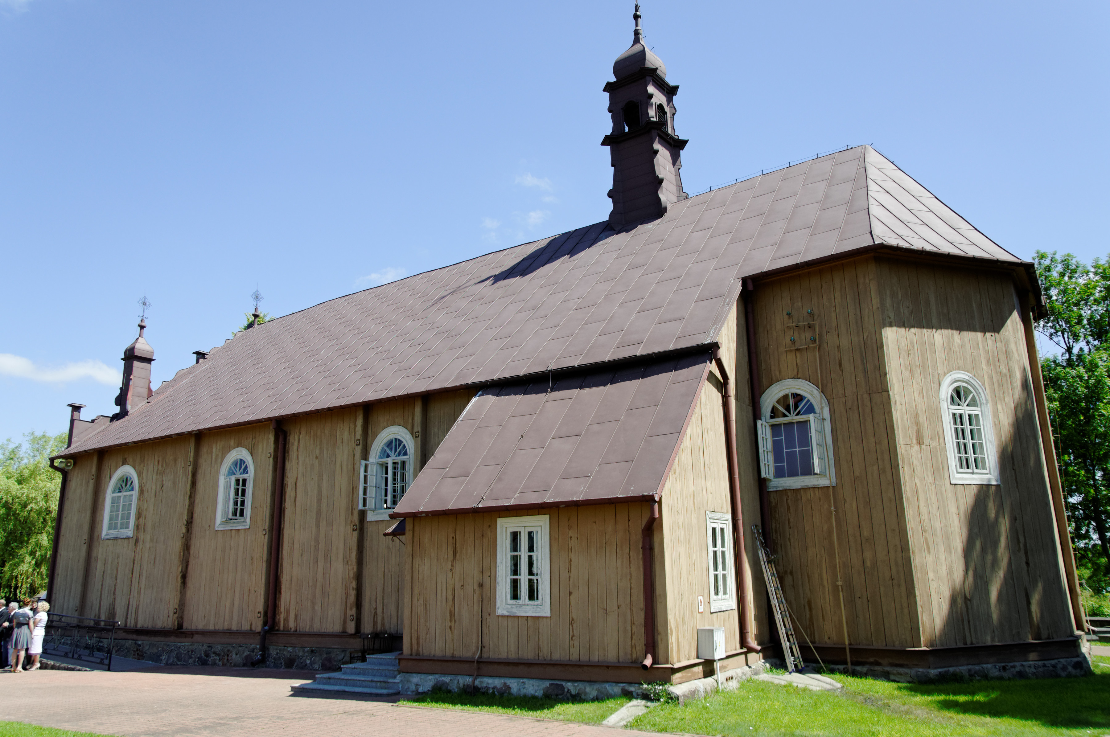 Kościół Najświętszej Maryi Panny, Matki Zbawiciela w Domanowie odbudowany w 1763 r